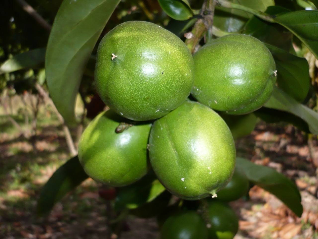 C. orinocense fruta de cacay en crecimiento